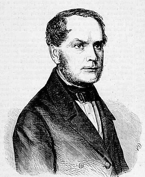 Dominik Szulc 1787-1860